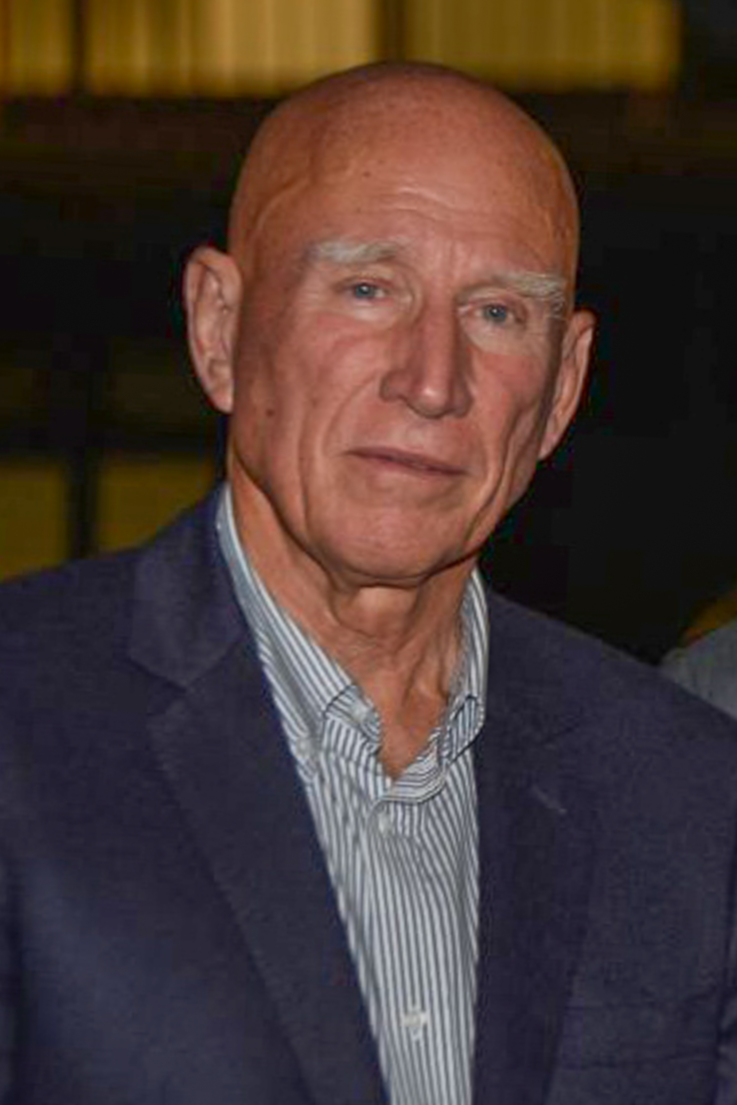 Doação de obra de Sebastião Salgado ao acervo do Itamaraty